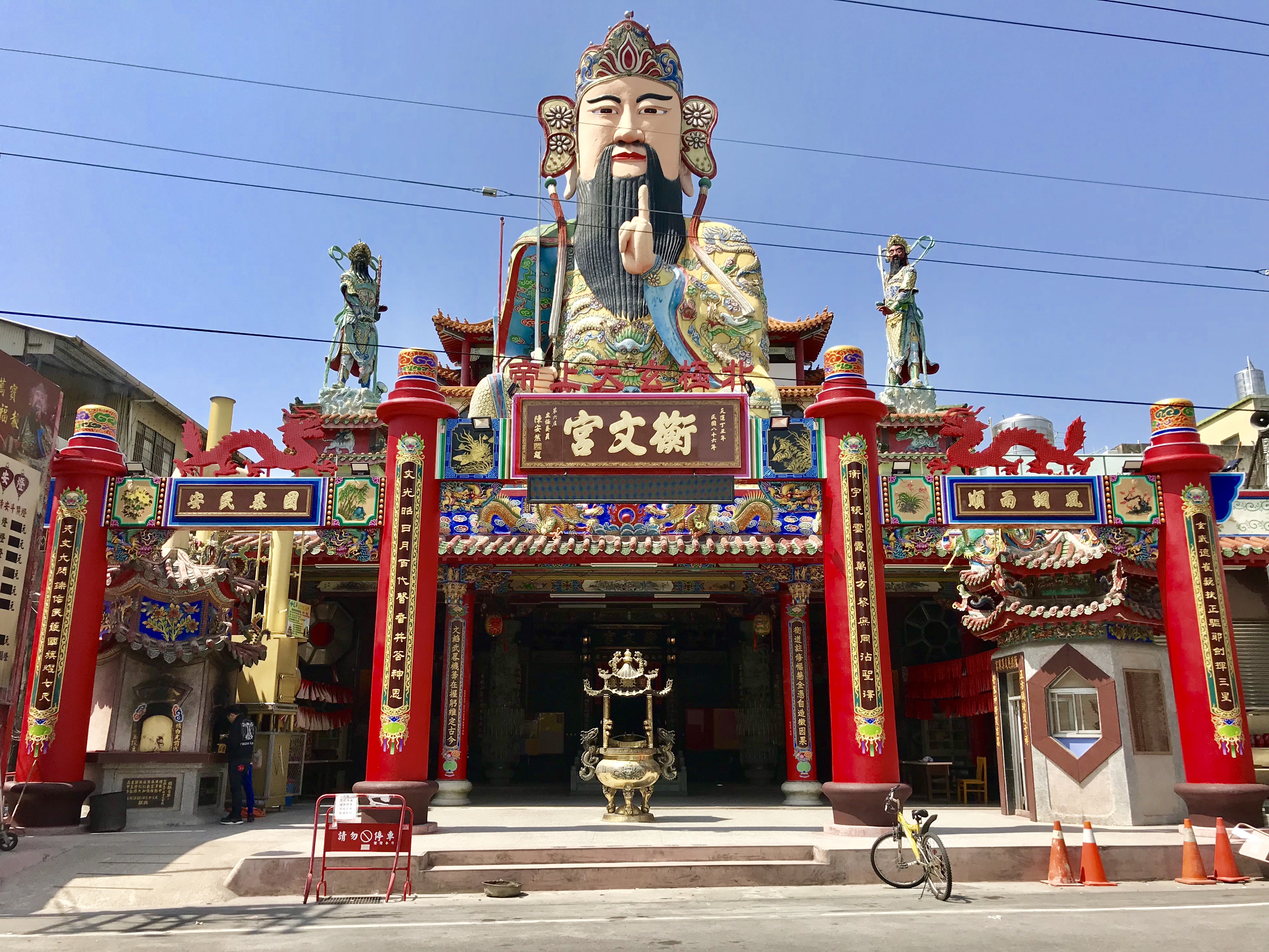 中文（台灣）: 員林衡文宮正面照